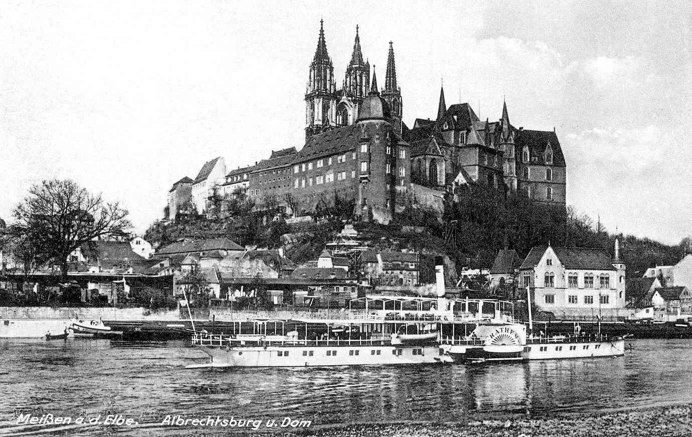 Meißen; Albrechtsburg und Dom - Elbe mit Dampfer Rathen This postcard is from publisher Brück & Sohn in Meißen ( postcard has a unique number 26454 and is available in a higher resolution at the publisher. This images was uploaded in a cooperation project between Wikipedians and the publisher.